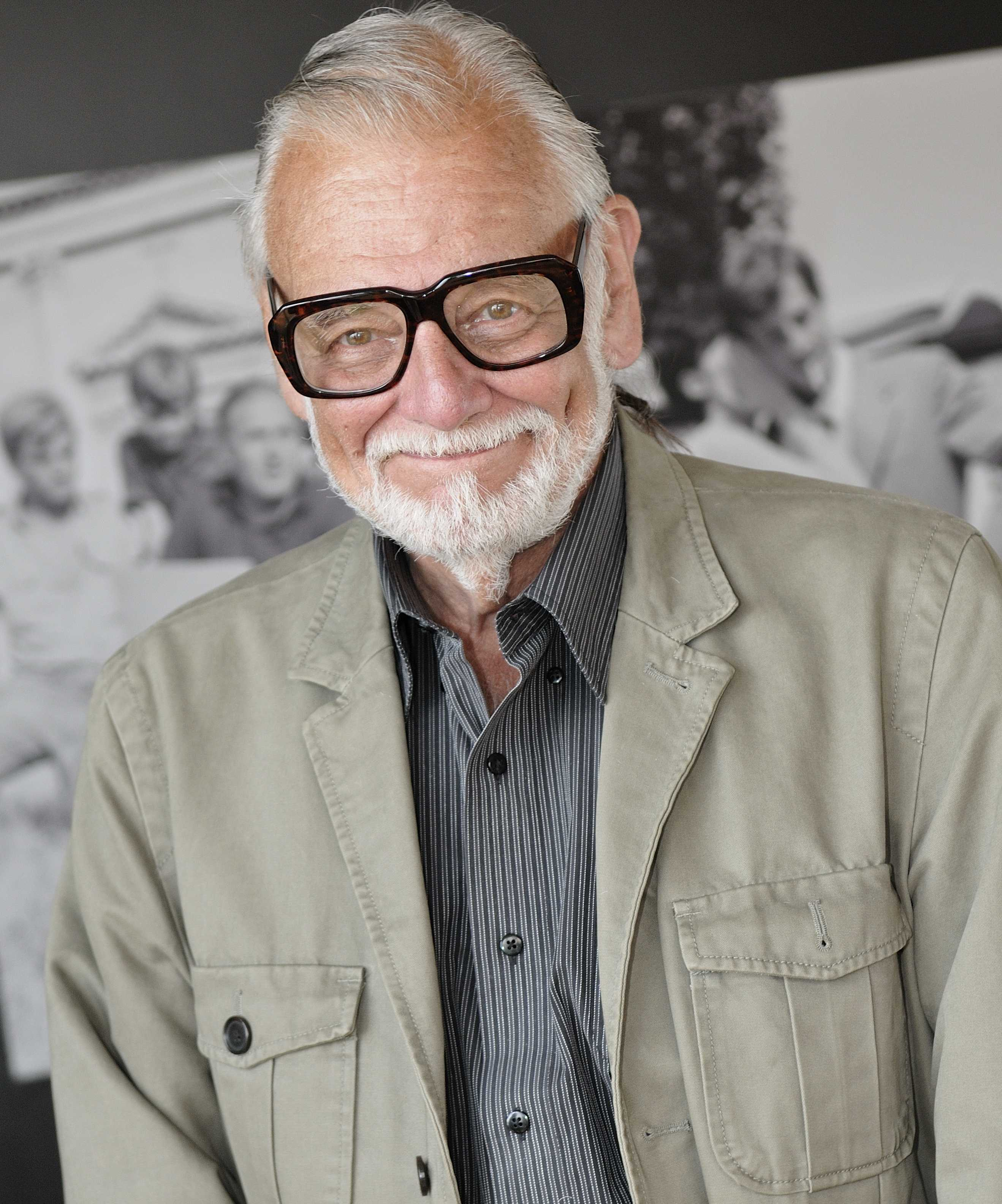 66ème Festival du Cinéma de Venise (Mostra), 8ème jour (07/09/2009) George Romero pour une interview avec Laurent Pecha d'